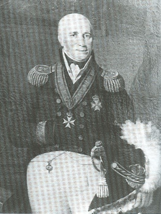 Admiraal Verdooren van Asperen